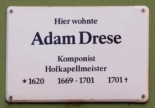 Gedenktafel für den Kapellmeister und Komponisten Adam Drese in Jena, Romantikerhaus